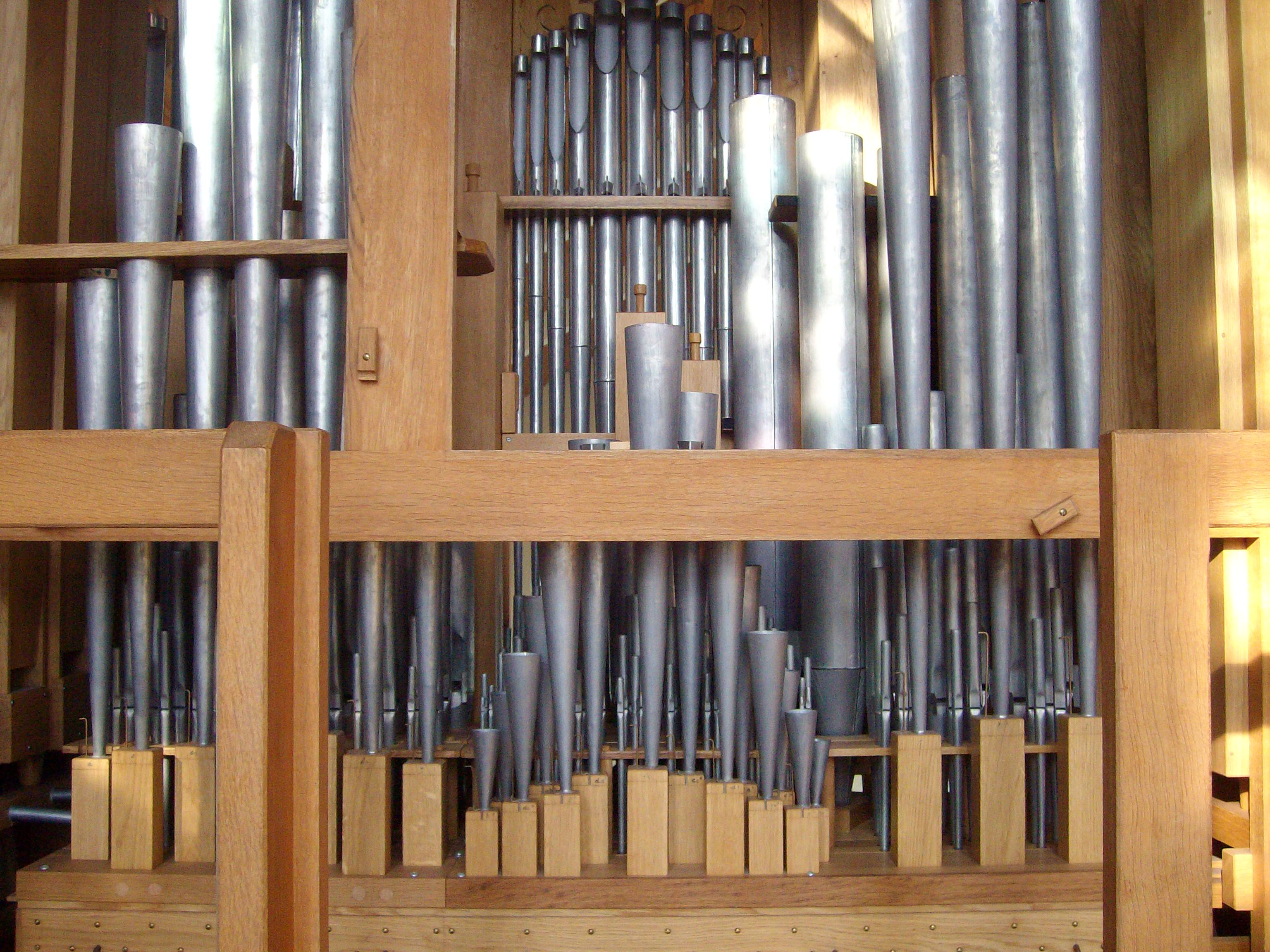 Hauptwerk der Orgel der Evangelisch-altreformierten Kirche Bunde, Ostfriesland, Niedersachsen, Deutschland